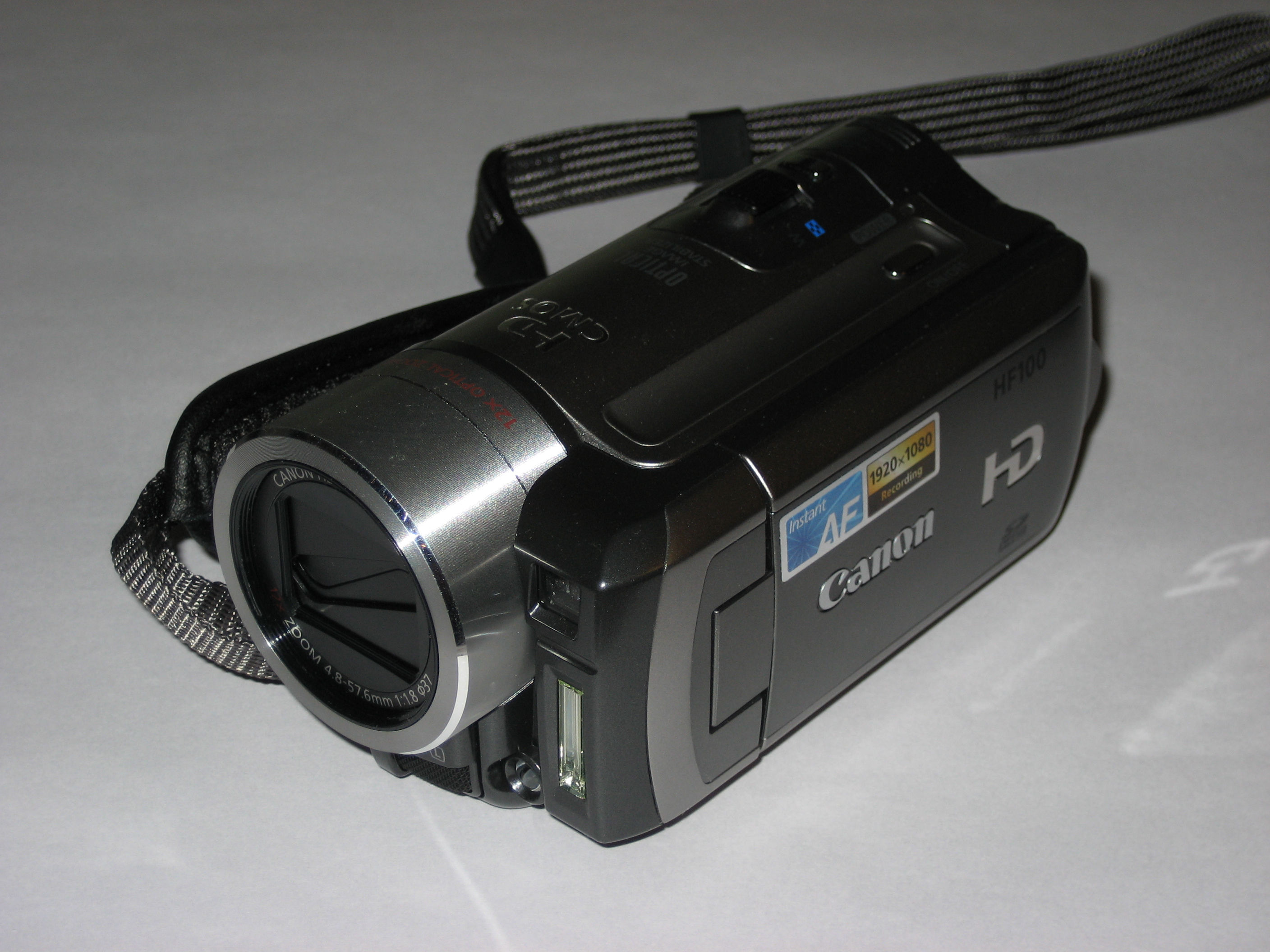 Камера Canon HF-100